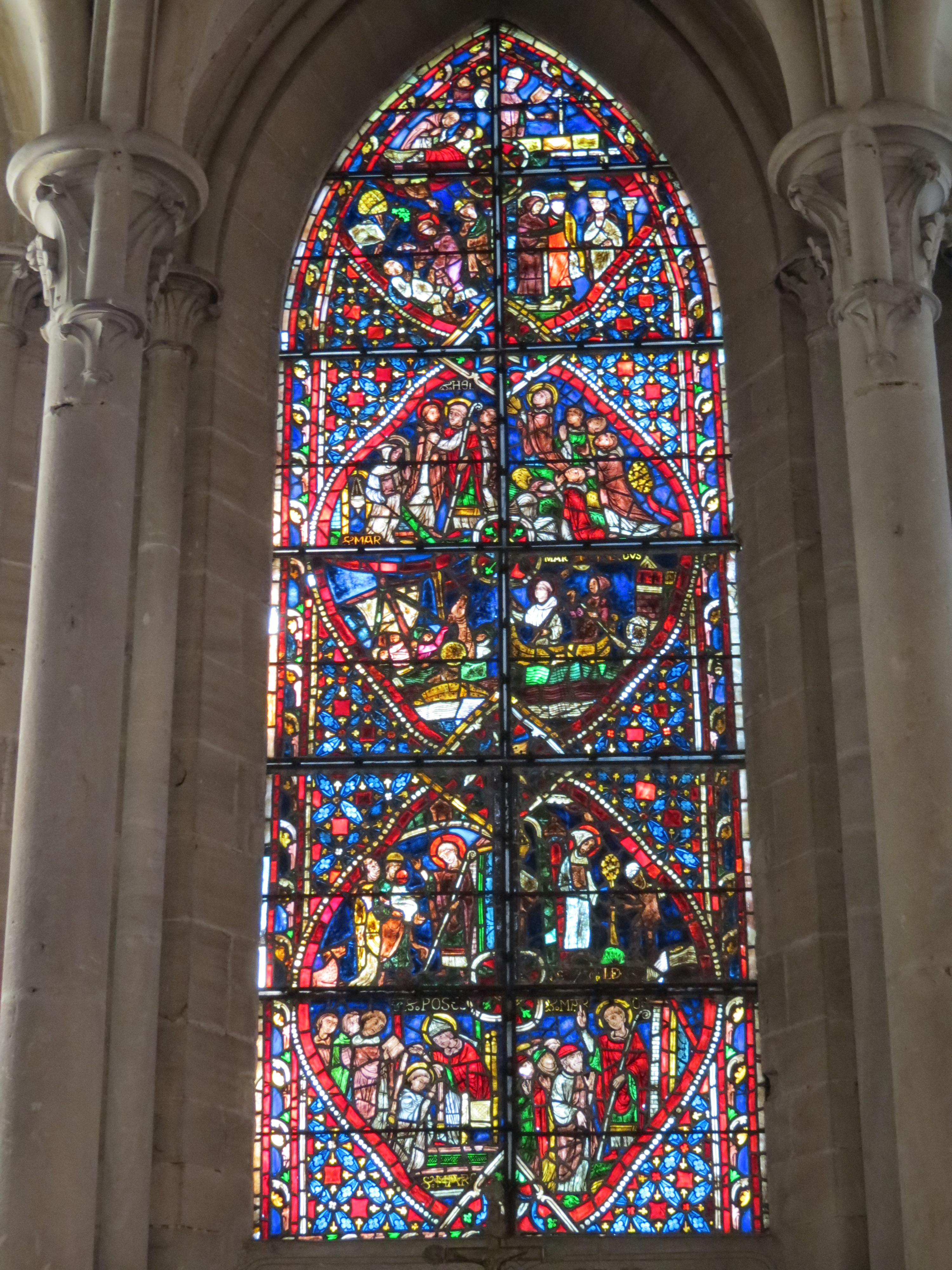 Verrière de la chapelle Saint-Marcouf, réalisée vers 1225-1230.